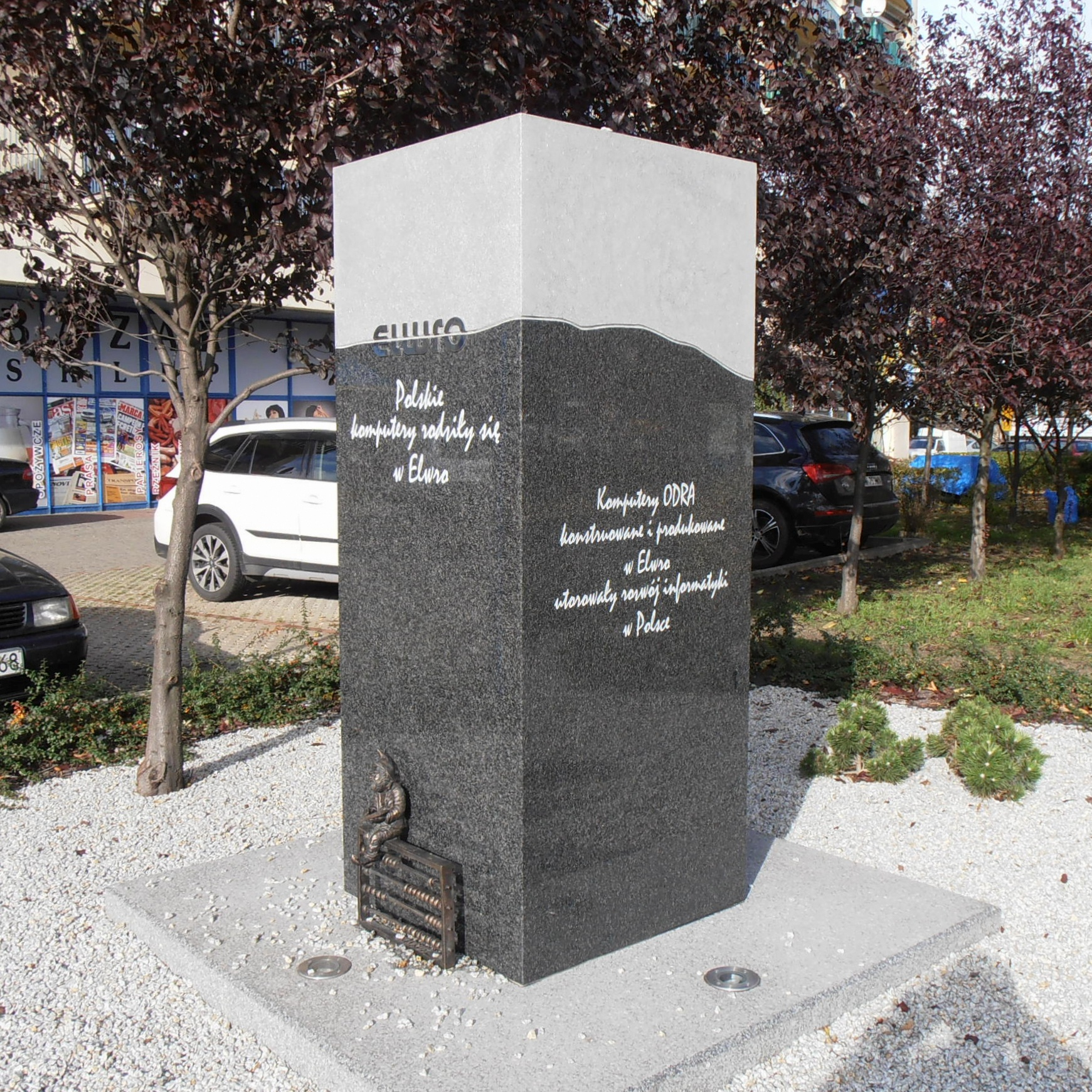 Wrocław. Skwer Elwro. Obelisk.